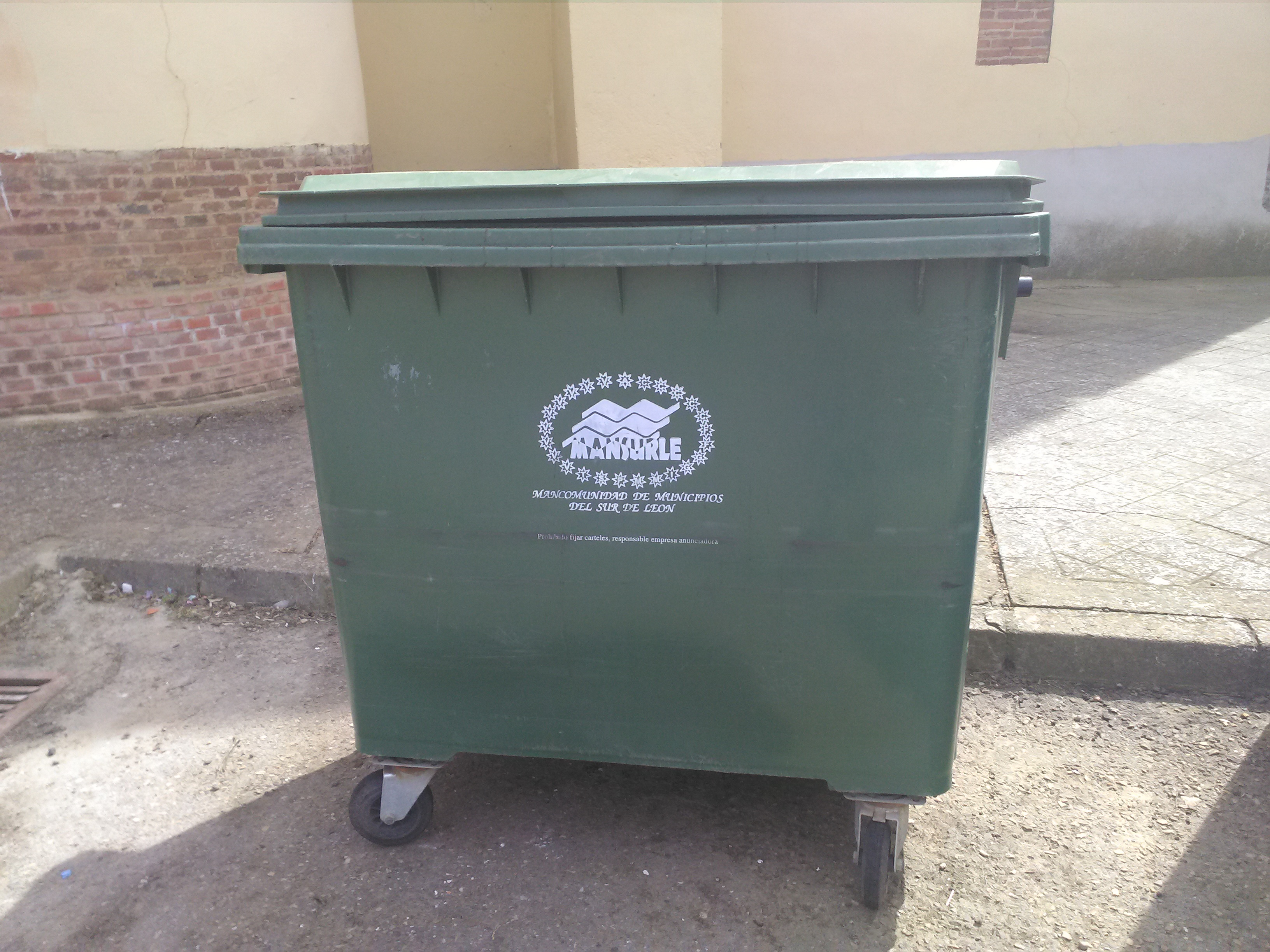 Un contenedor de basura perteneciente a la Mancomunidad de Municipios del Sur de León (MANSURLE), comunidad autónoma de Castilla y León, España.